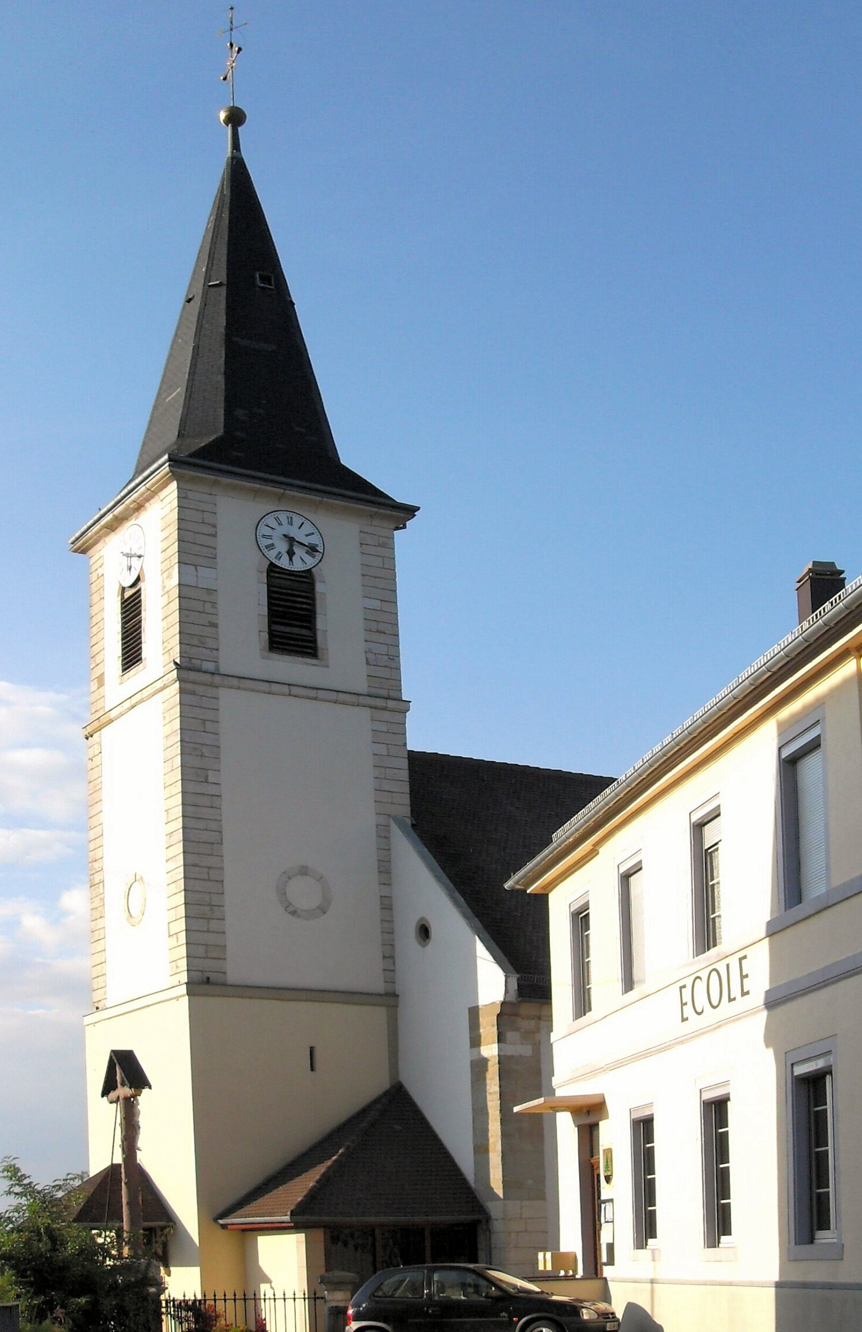 L'église Saint-Maurice et l'école à Wolschwiller